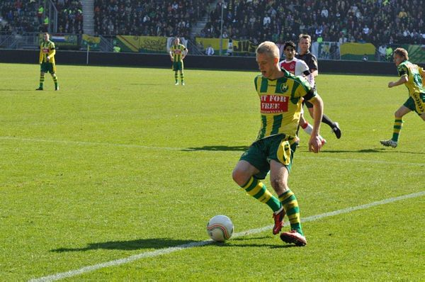 Lex Immers